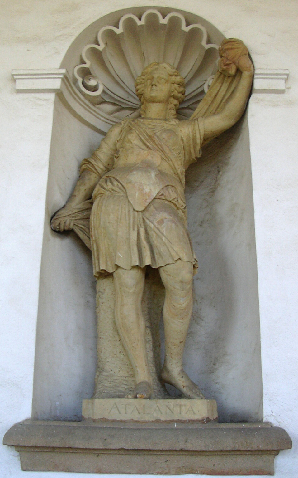 Atalanta - socha Kroměříž Květná zahrada